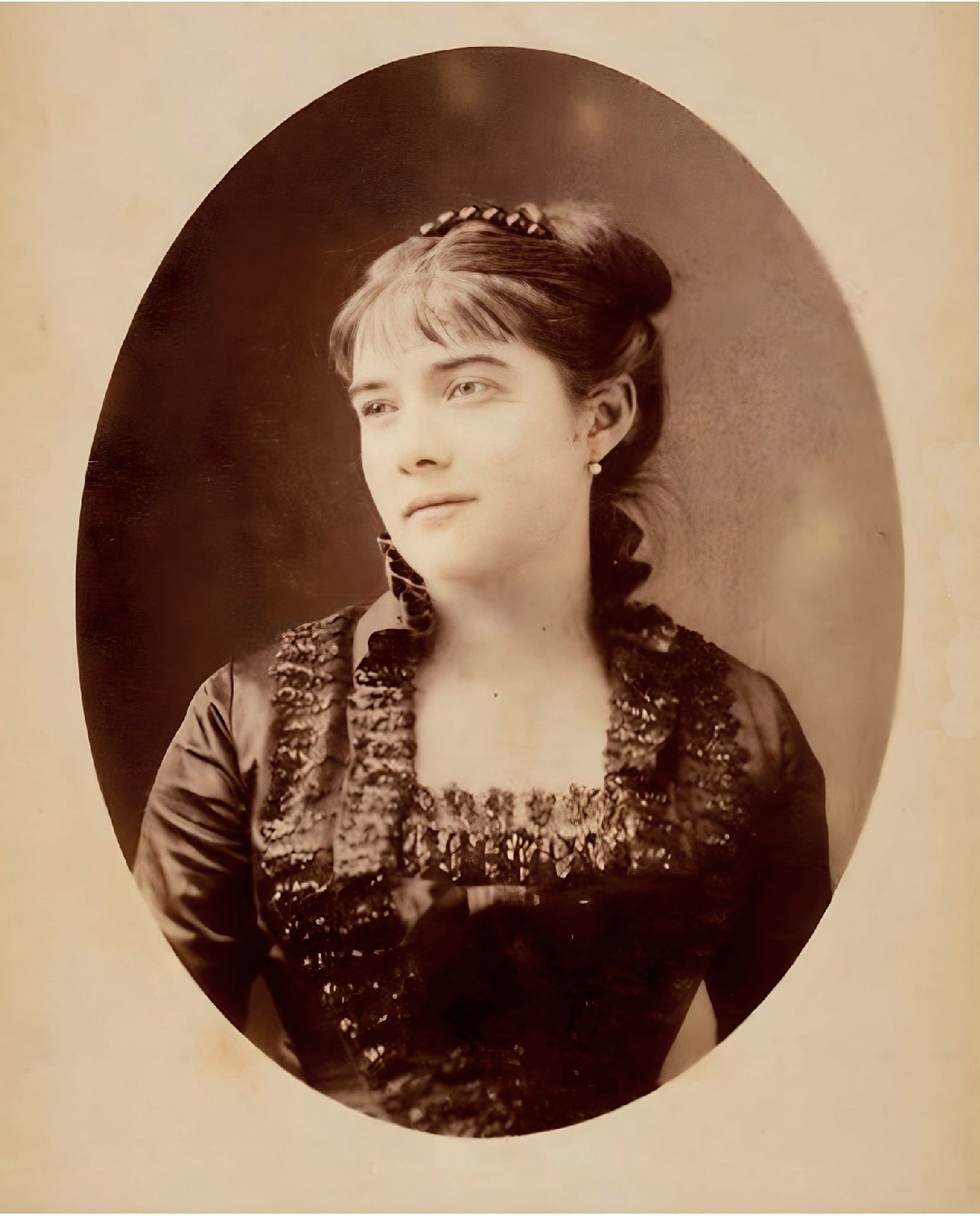 Mathilde Mauté (1853-1914) ex-Madame Verlaine